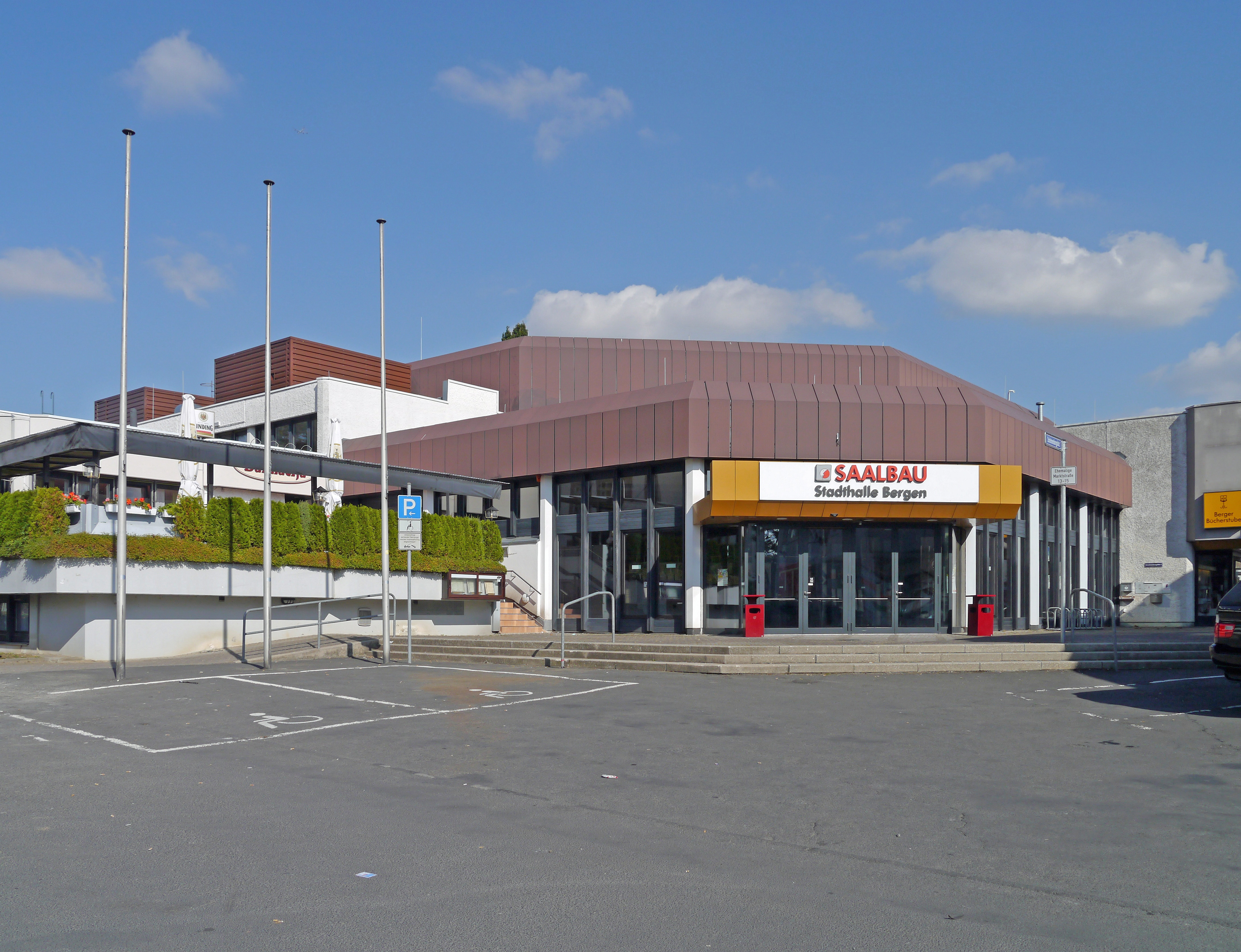 Das "Bürgerhaus" Stadthalle Bergen, 2013 in Ffm-Bergen-Enkheim..